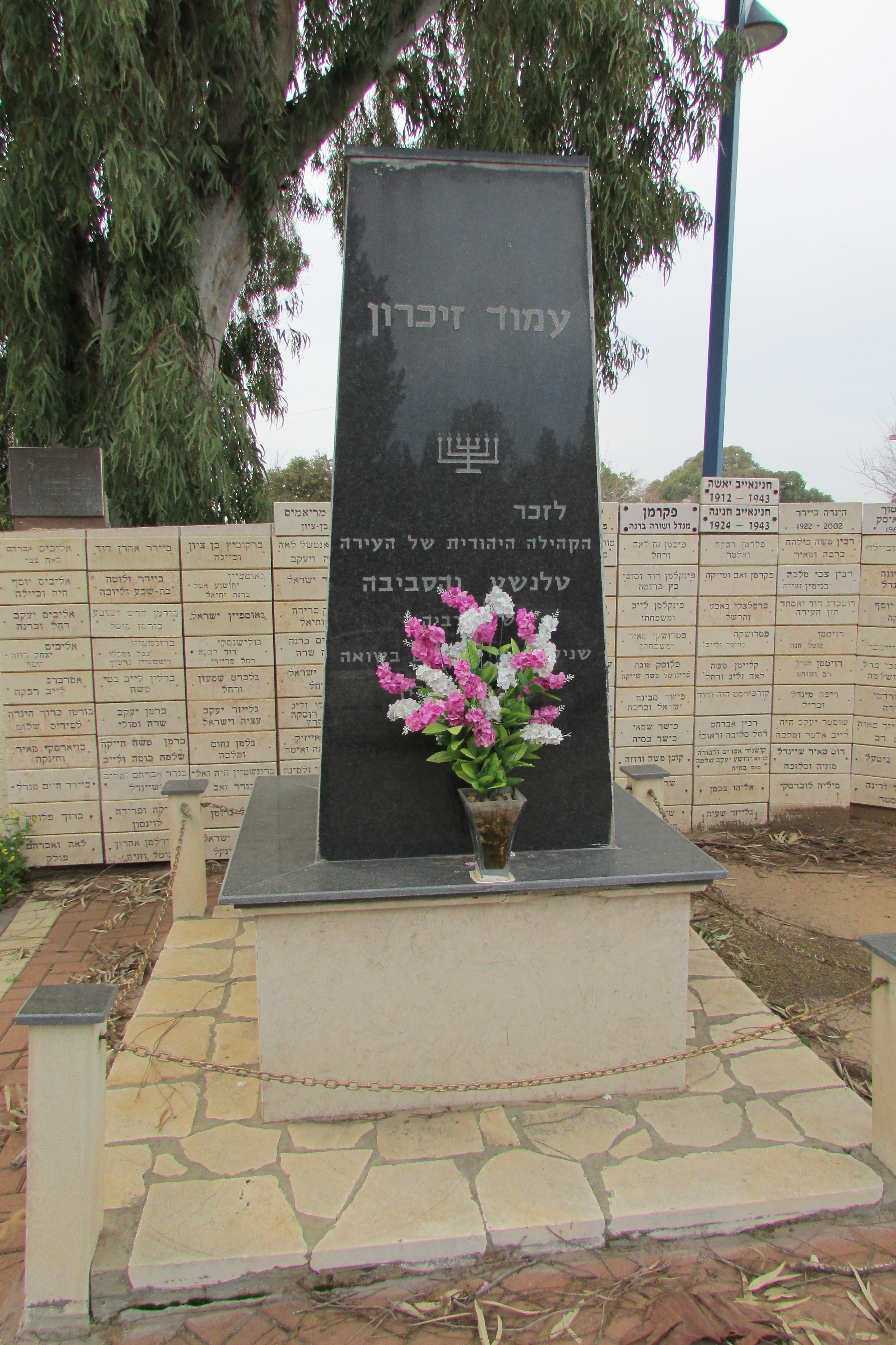 Pardes Hanna cemetery